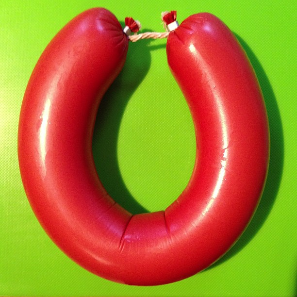 Falukorv.